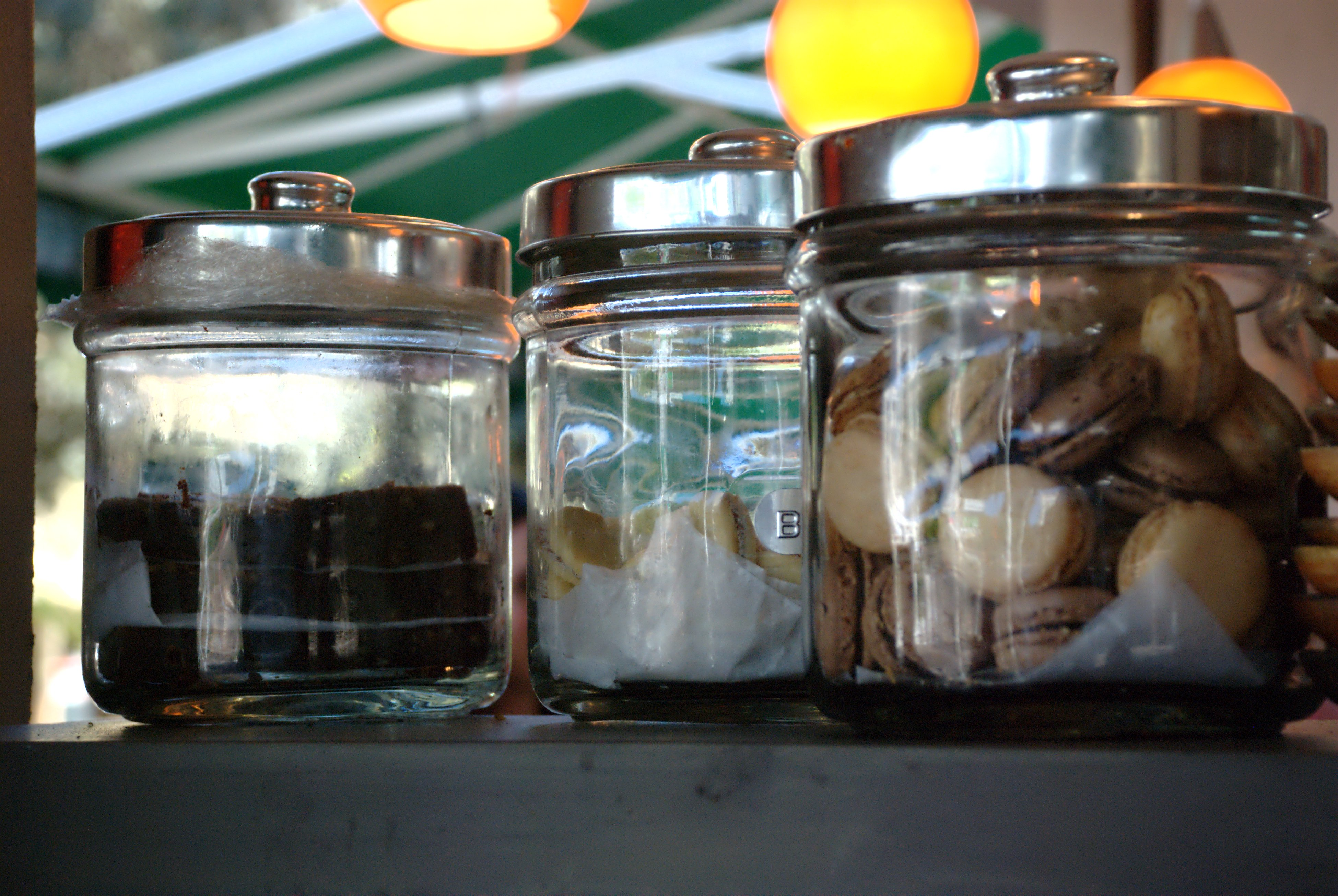 Glass cookie jars